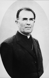 Mgr Paul-Louis Carrière, évêque de Laval (France)